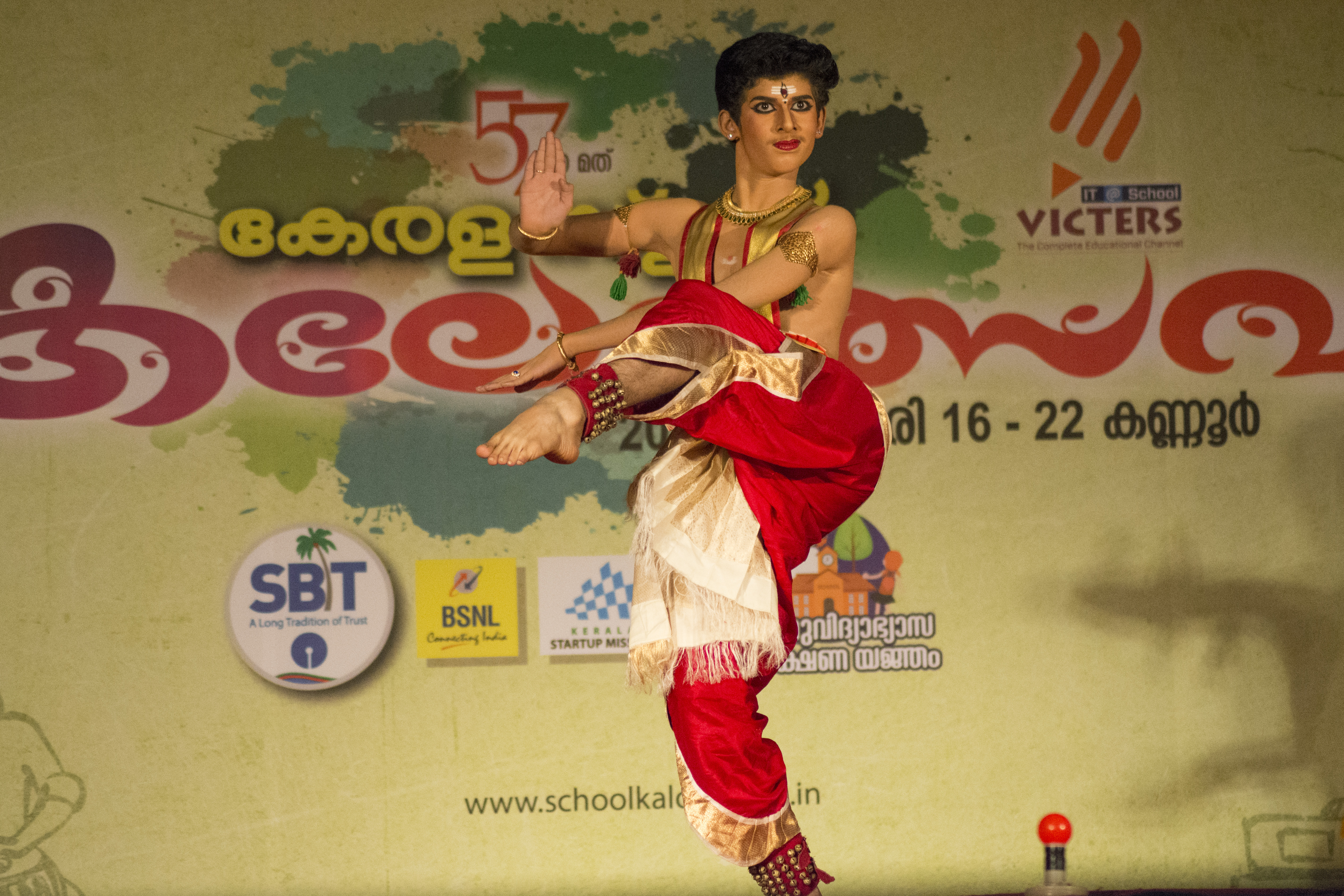 Kerala SchoolKalolsavam 2017